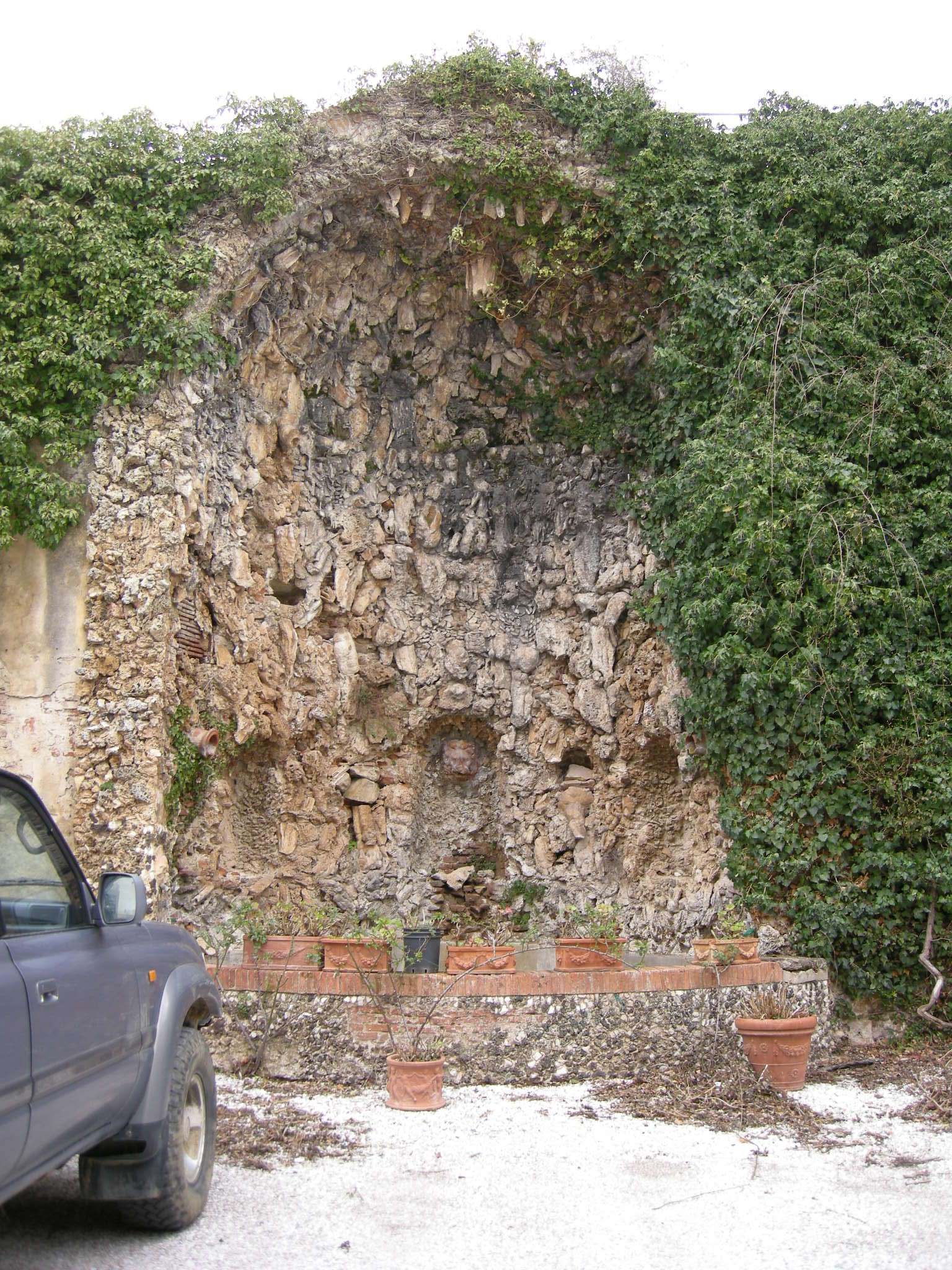 Villa di agnano, cortile 04 grotta